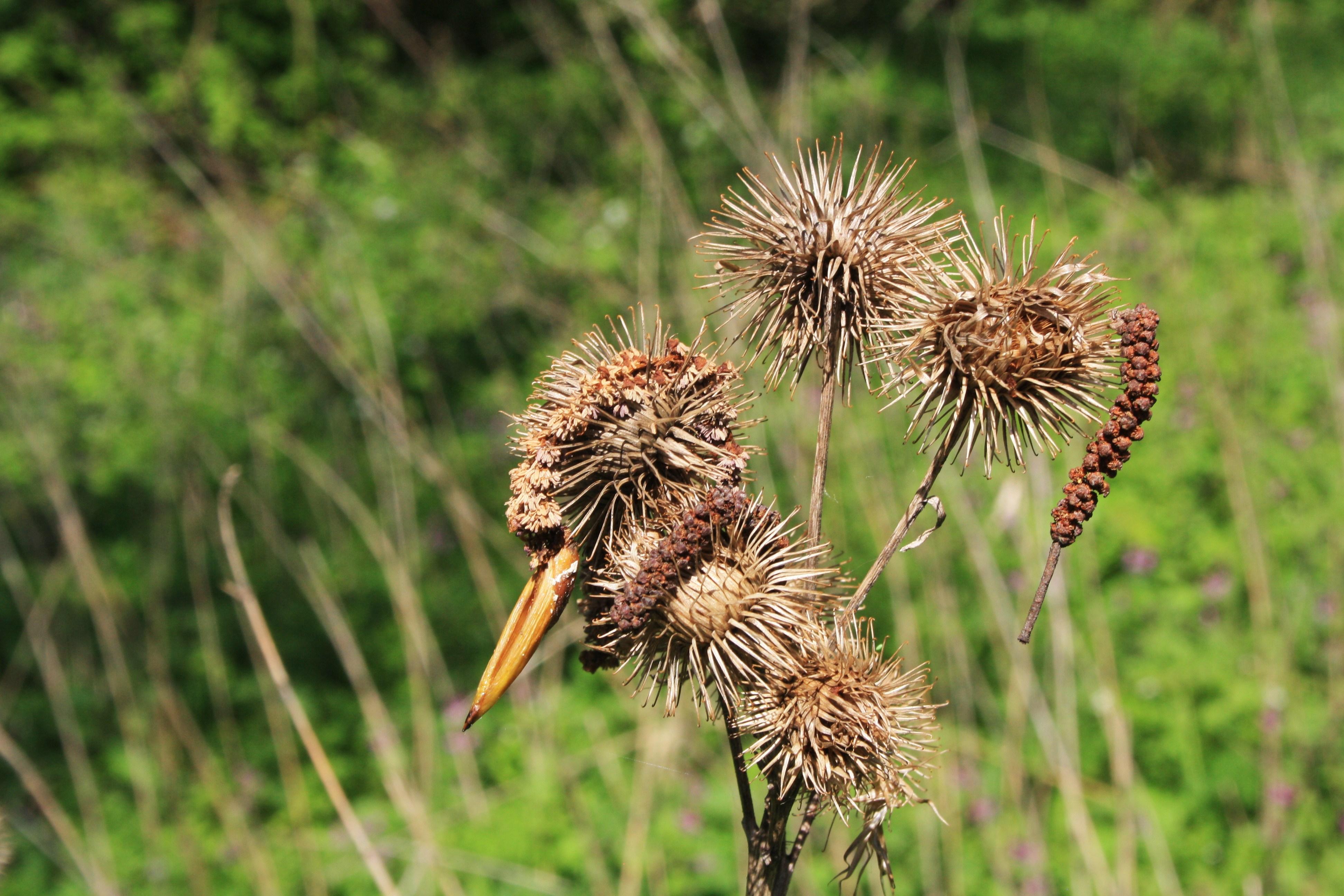 Große Klette (Arctium lappa), Naturschutzgebiet und Naturdenkmal "Tümpel an der Fliede" in Eichenzell